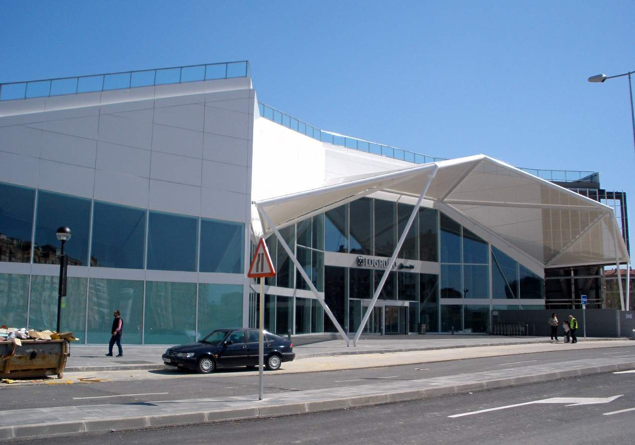 Nueva estación de ADIF, Logroño